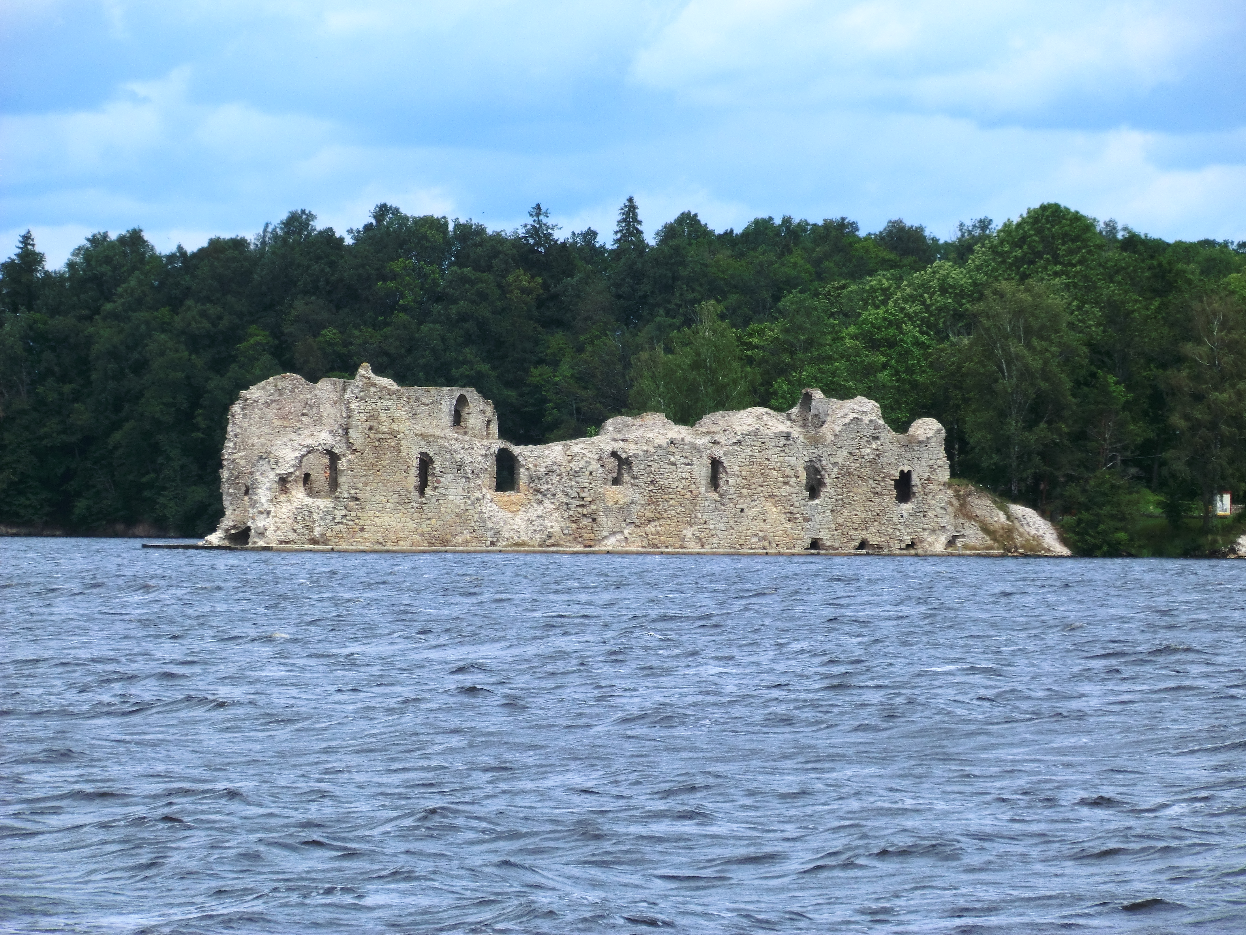 Kokneses pilsdrupas